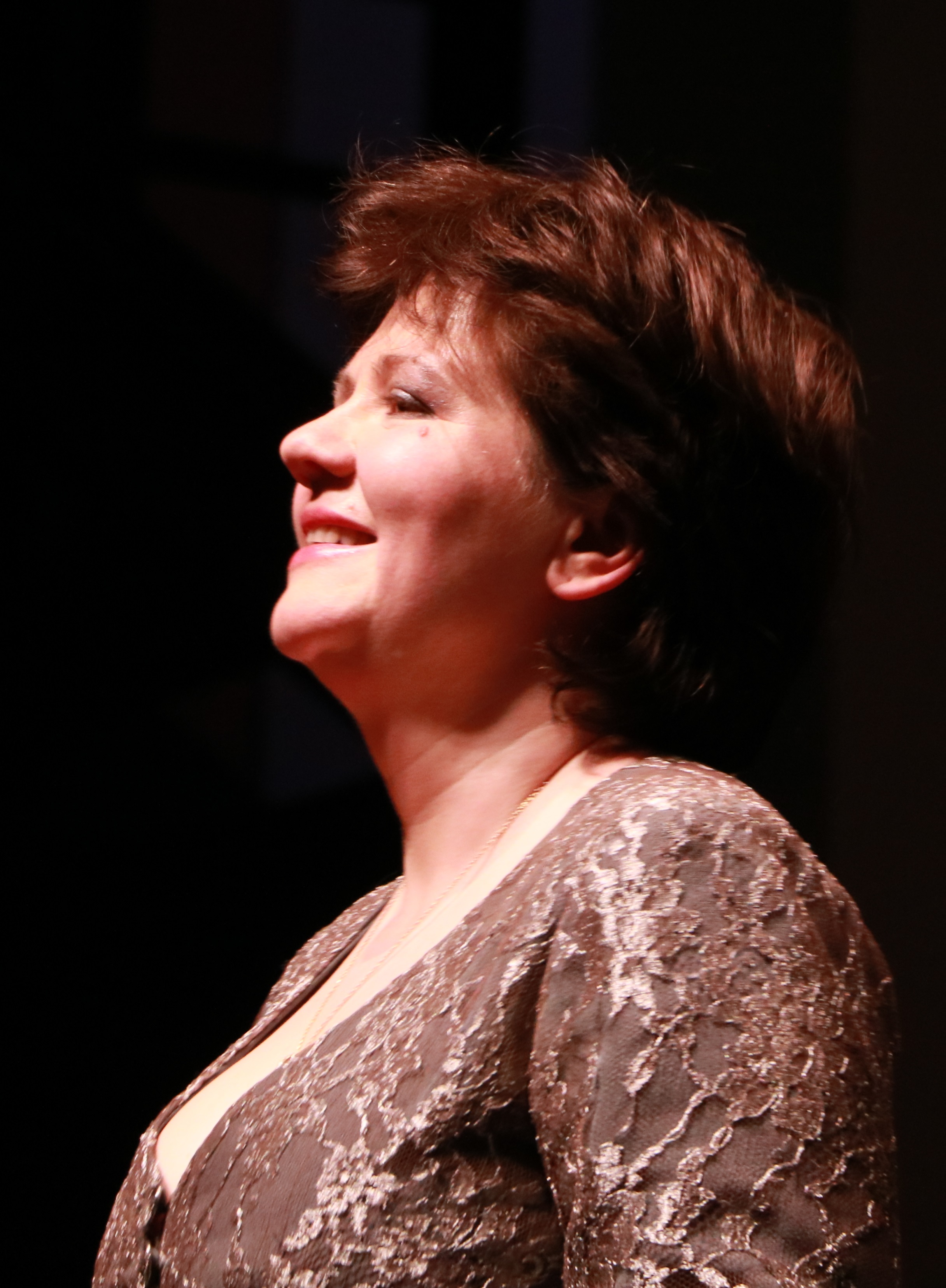 Dana Ciocarlie à La Folle Journée 2018 à Nantes (portrait).